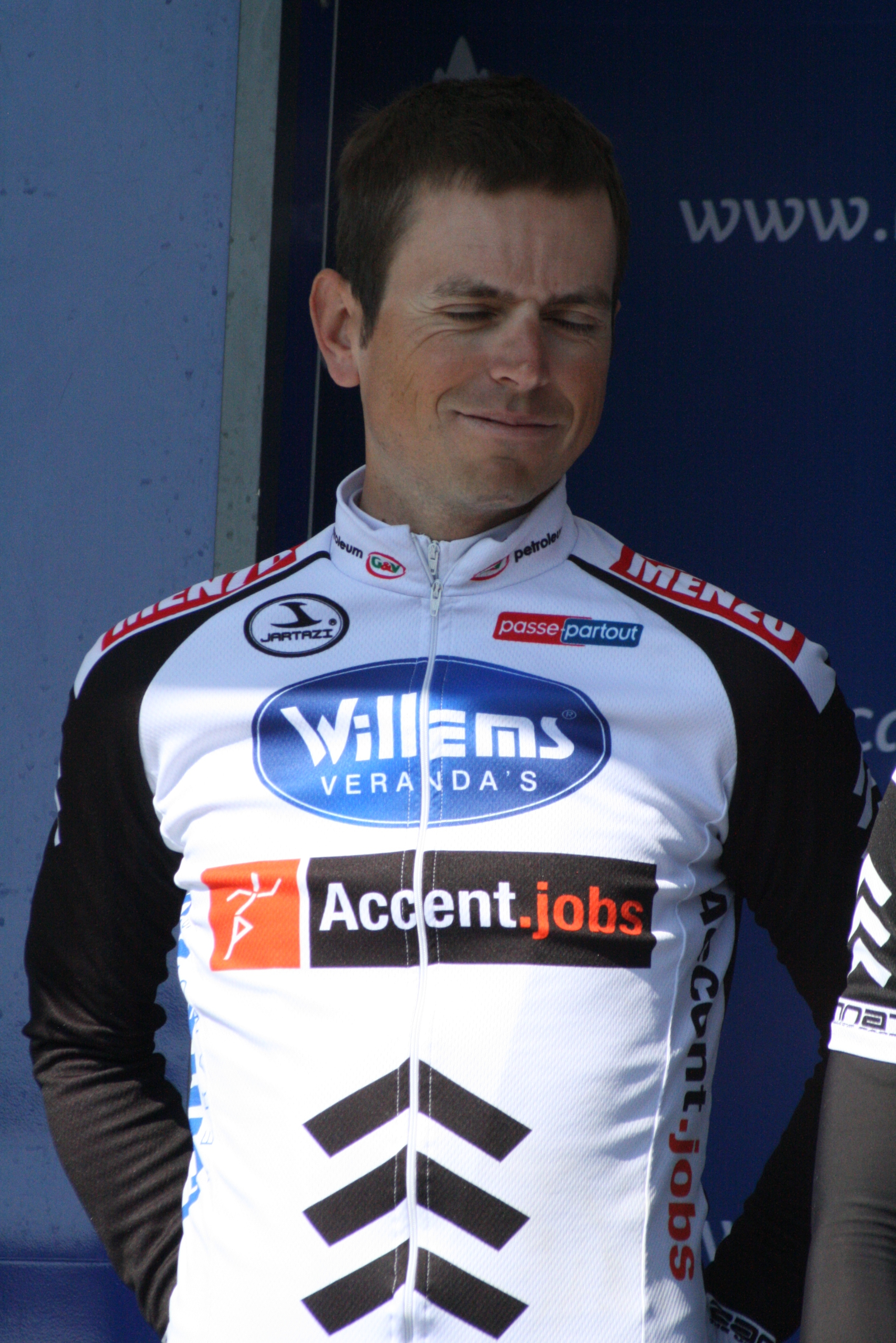 Présentation des coureurs au départ de la première étape Jurgen Van Goolen